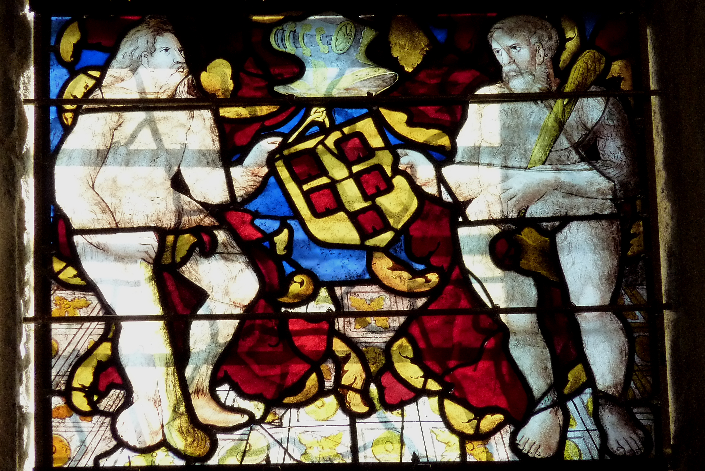 Kirche Saint-Cyr-et-Sainte-Julitte in Crouy-sur-Ourcq im Département Seine-et-Marne (Île de France), im 16./17. Jahrhundert erbaut, Bleiglasfenster im Chor mit Wappen